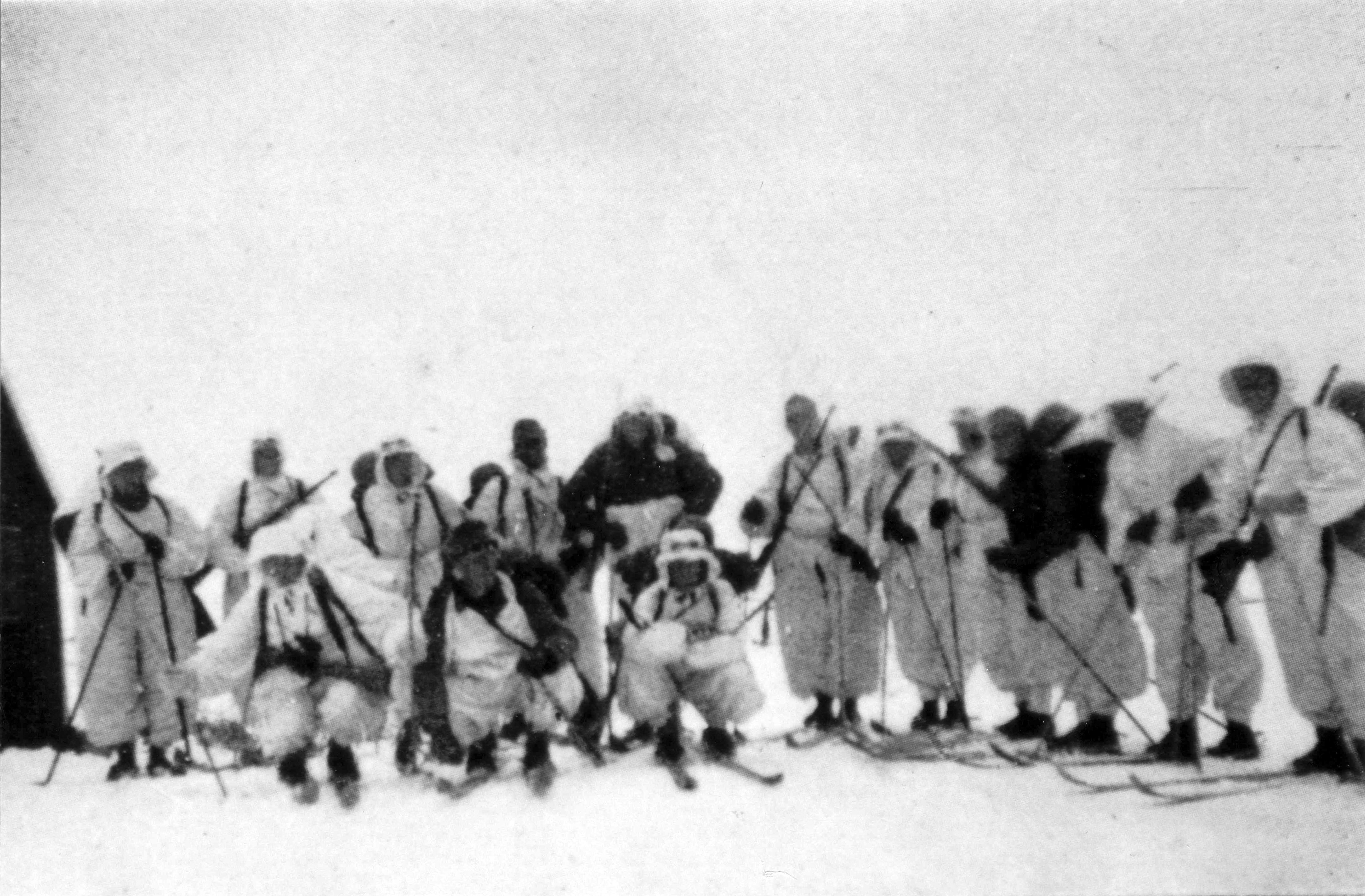 Korgfjellet Tittel / Title: Østerriske soldater fra 2. bergjegerdivisjon på vei over Korgenfjellet. Dato / Date: Mai 1940 Fotograf / Photographer: Ukjent/Unknown Sted / Place: Korgfjellet, Nordland, Norge Eier / Owner Institution: Arkiv i Nordland Lenke / Link: Arkiv i Nordland Arkivreferanse /Archive reference: AIN.NA143.0145 Fra Dag Skogheims Privatarkiv